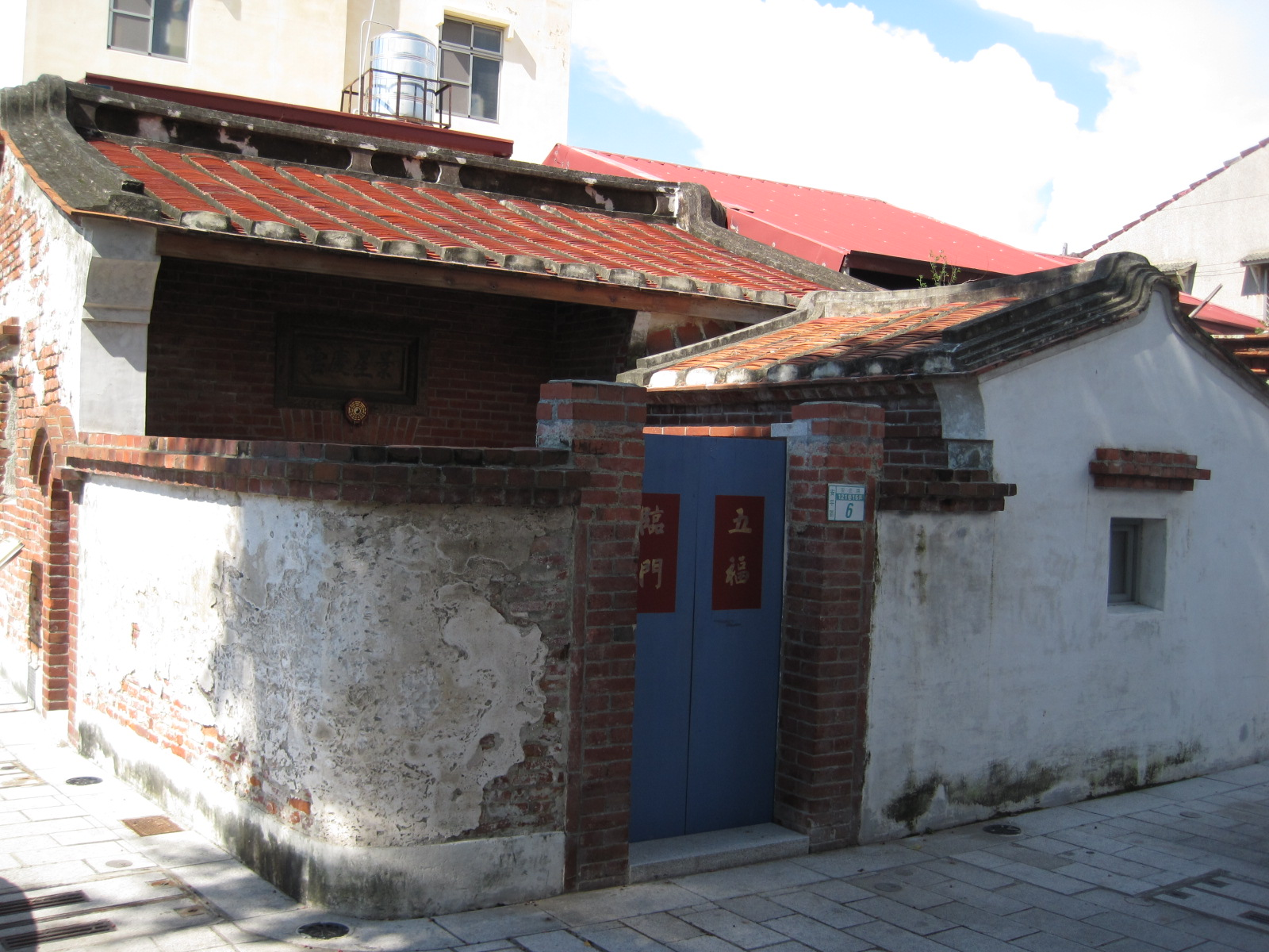 臺南安平海頭社魏宅